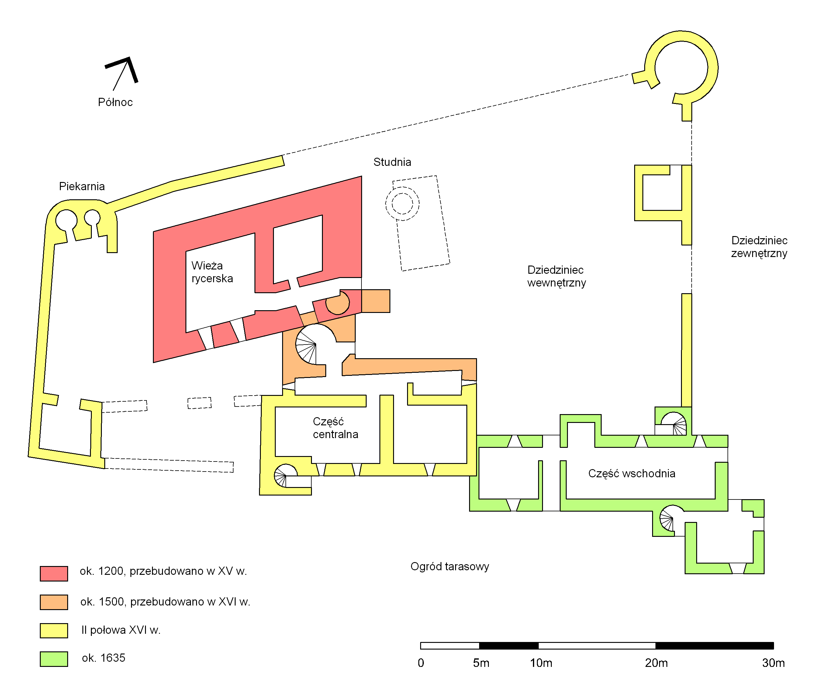 Plan Aberdour Castle w Szkocji ukazujący fazy budowy.